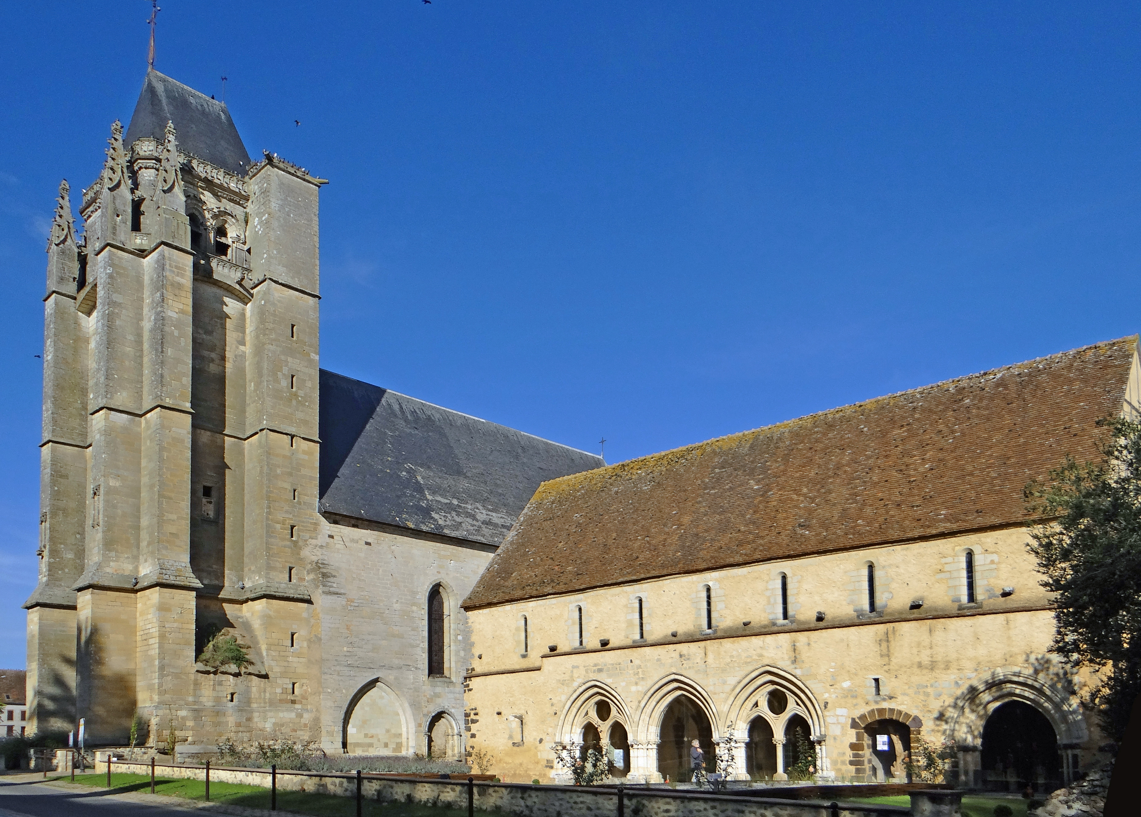 Massay - Abbaye Saint-Martin - Salle capitulaire et tour Chamborand de l'église Saint-Paxent (ancienne abbatiale)